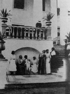 Беларуская (тарашкевіца): Раванічы (Ravaničy), сядзіба Слатвінскіх (Słatvinski)